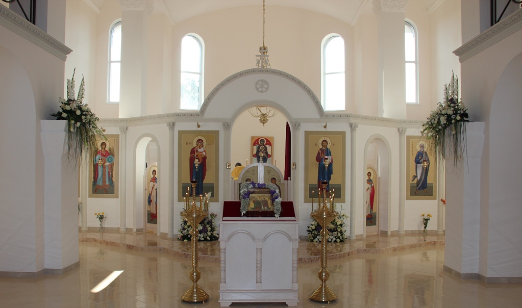 Нижний Андрее-Владимирский храм Воскресенского кафедрального собора УПЦ.